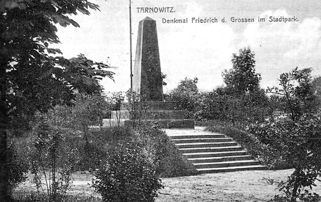 Obelisk Króla Prus Fryderyka II Wielkiego w Parku Miejskim w Tarnowskich Górach